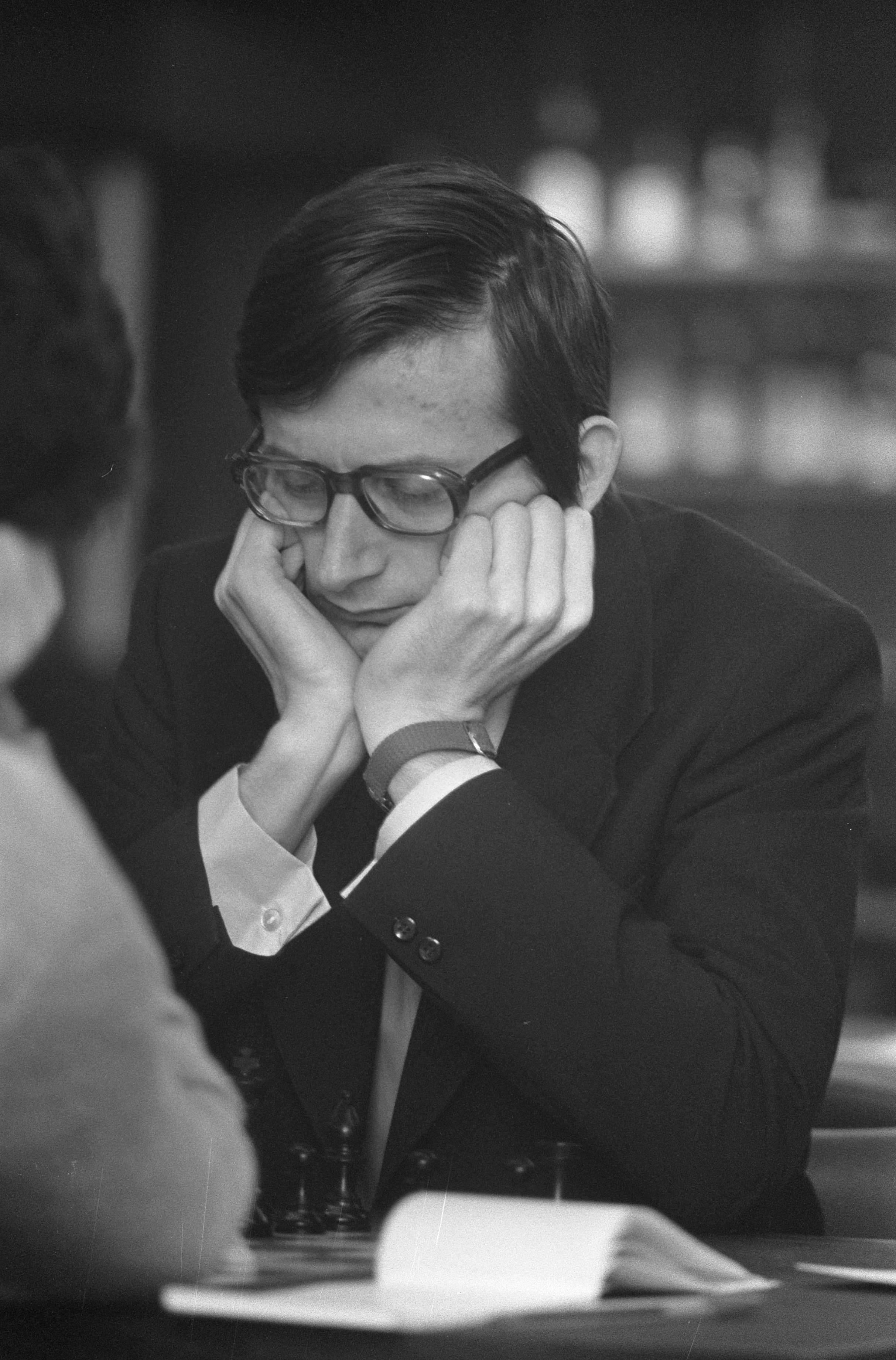 Collectie / Archief : Fotocollectie Anefo Reportage / Serie : Hoogovenschaaktoernooi Beschrijving : Planinc in actie Datum : 22 januari 1974 Locatie : Beverwijk, Noord-Holland Trefwoorden : portretten, schaken, schakers Persoonsnaam : Planinc, Albin Instellingsnaam : Hoogovenschaaktournooi Fotograaf : Fotograaf Onbekend / Anefo Auteursrechthebbende : Nationaal Archief Materiaalsoort : Negatief (zwart/wit) Nummer archiefinventaris : bekijk toegang 2.24.01.05 Bestanddeelnummer : 926-9592